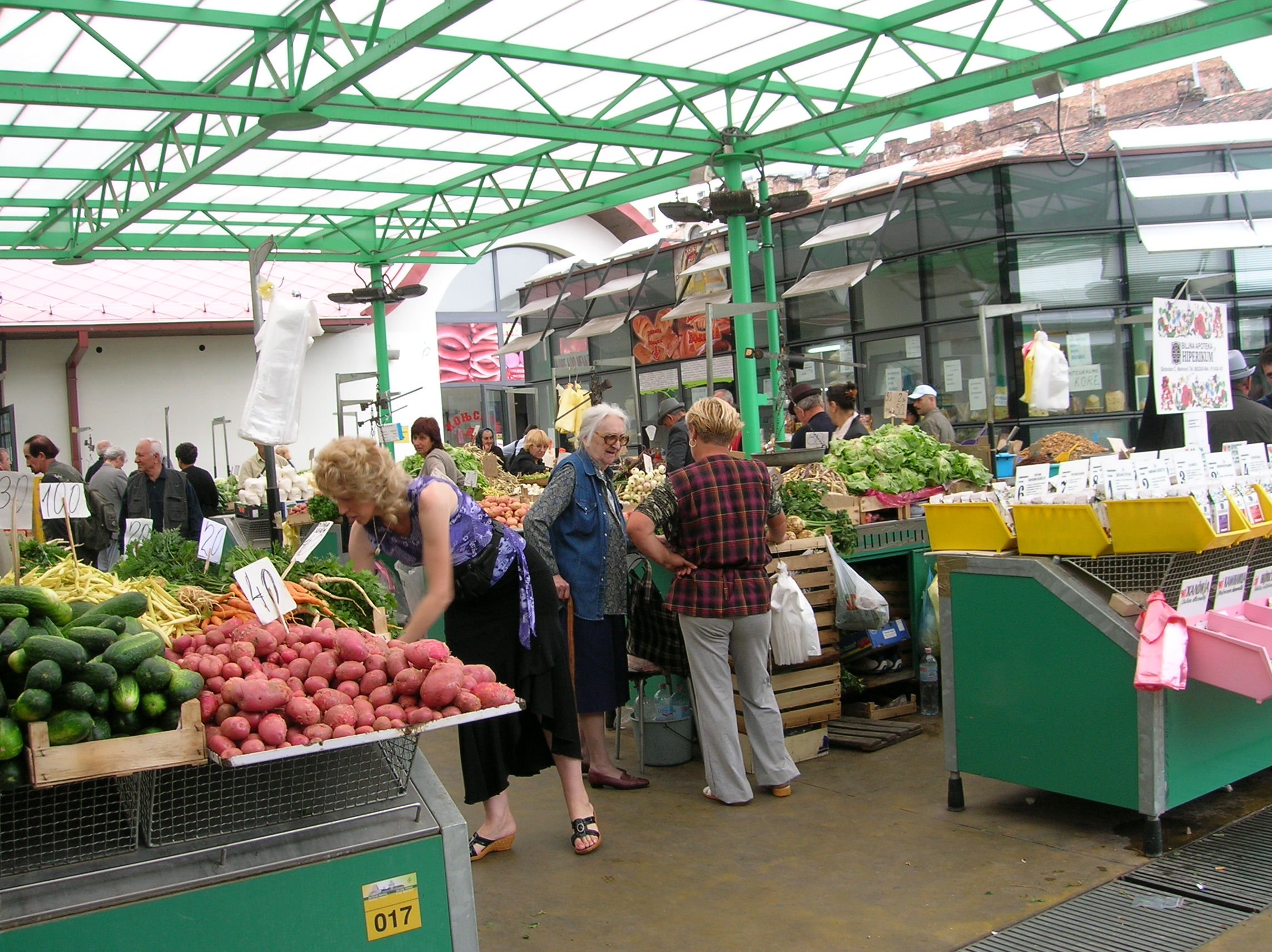 uredjivanje tezge